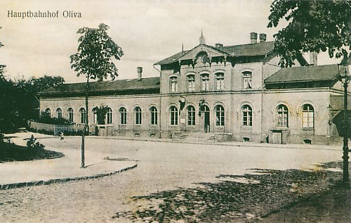 Dworzec kolejowy w Gdańsku Oliwie.